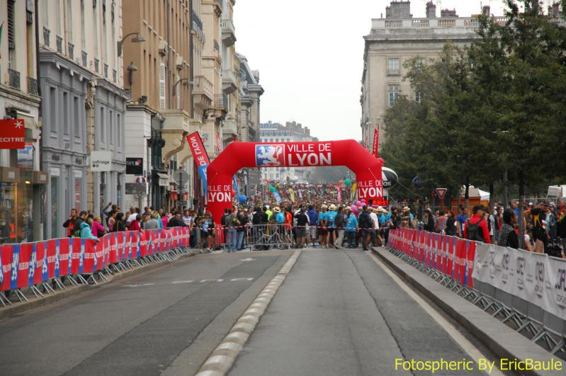 Depart RunInLyon 2012